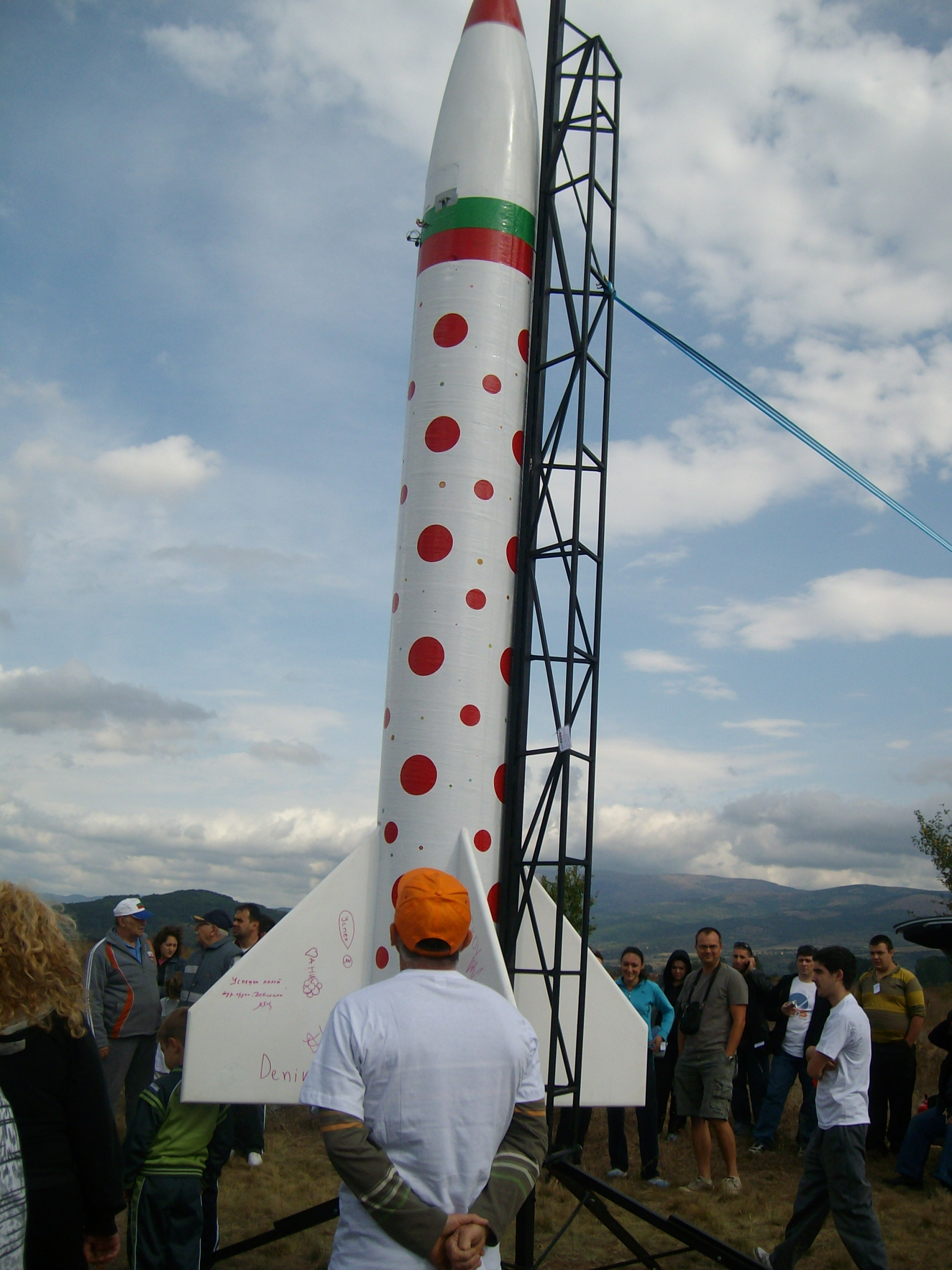 Любителска ракета Черешка 2010